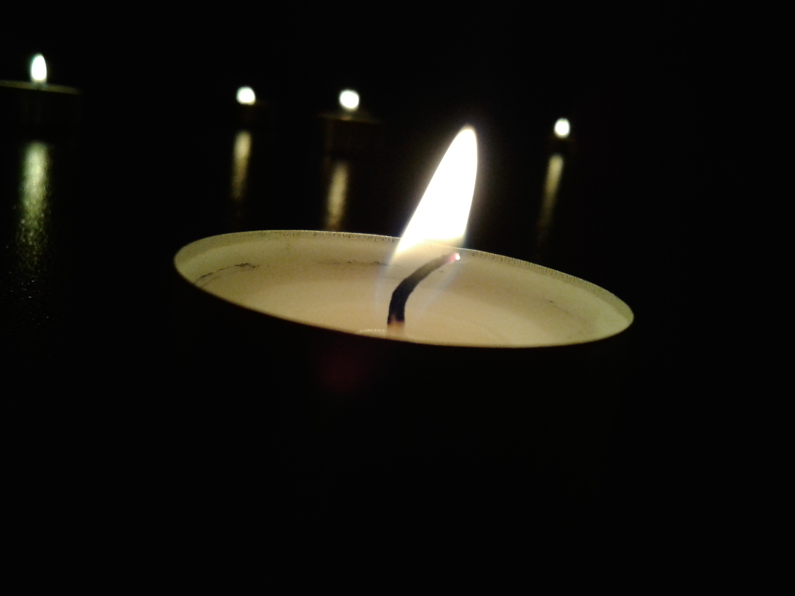 Mehrere Teelichter im Dunkeln, Makroaufnahme eines einzelnen